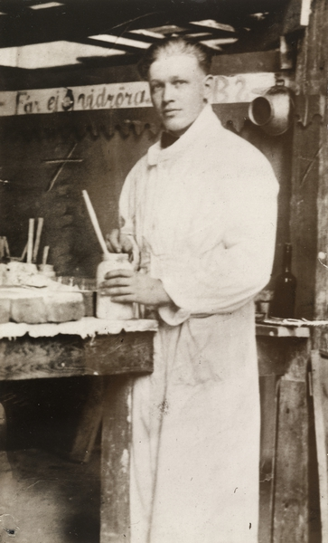 Gunnar Torhamn, svensk konstnär.